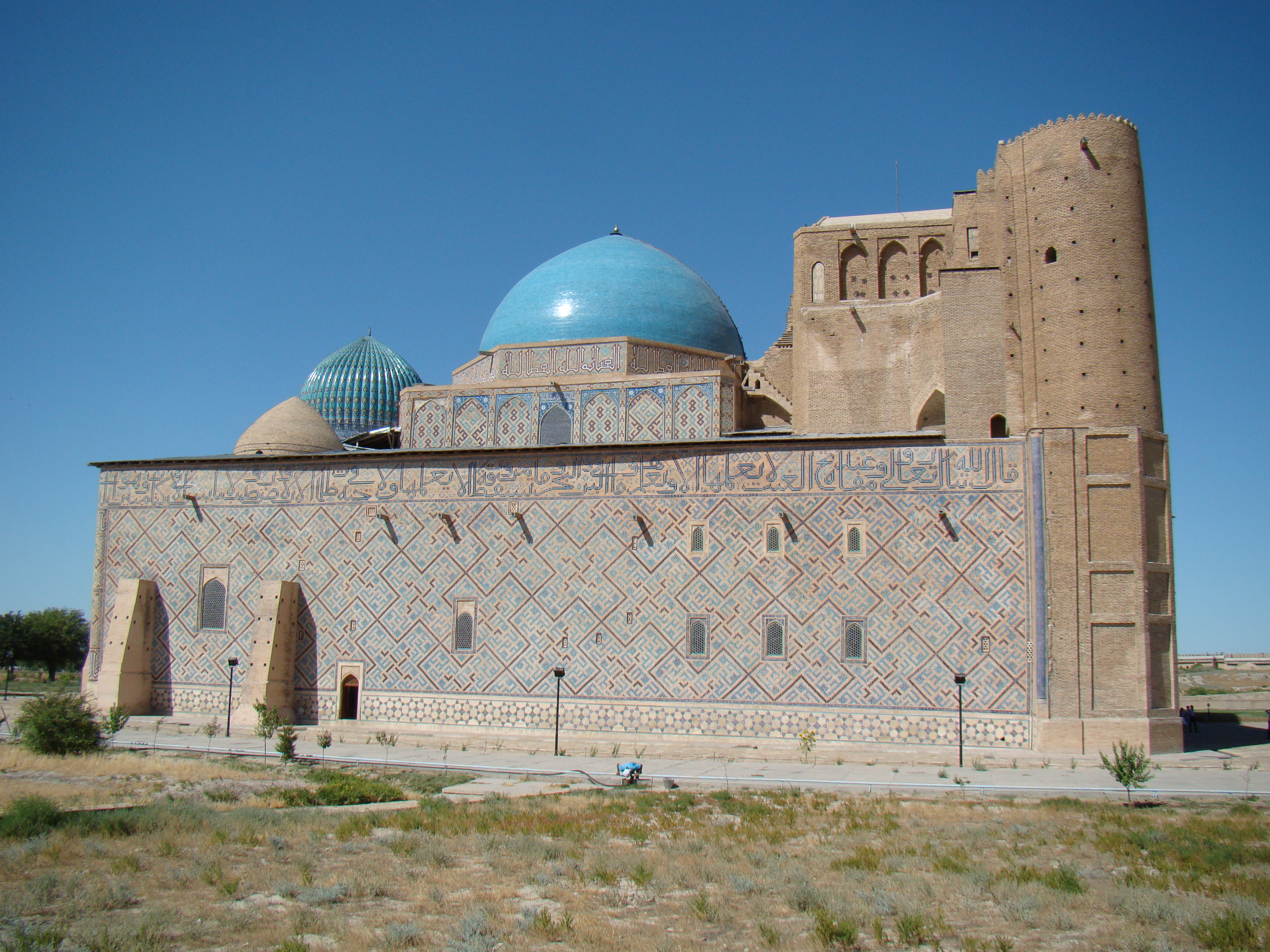 Ханака Ахмеда Ясави